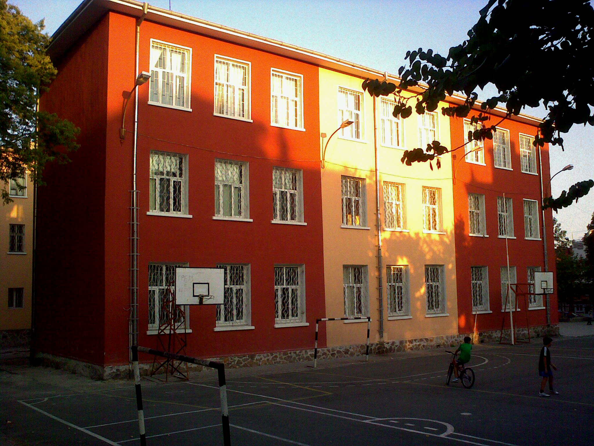 Burgas, Bulgarien - Die Grundschule Kjanz Boris I